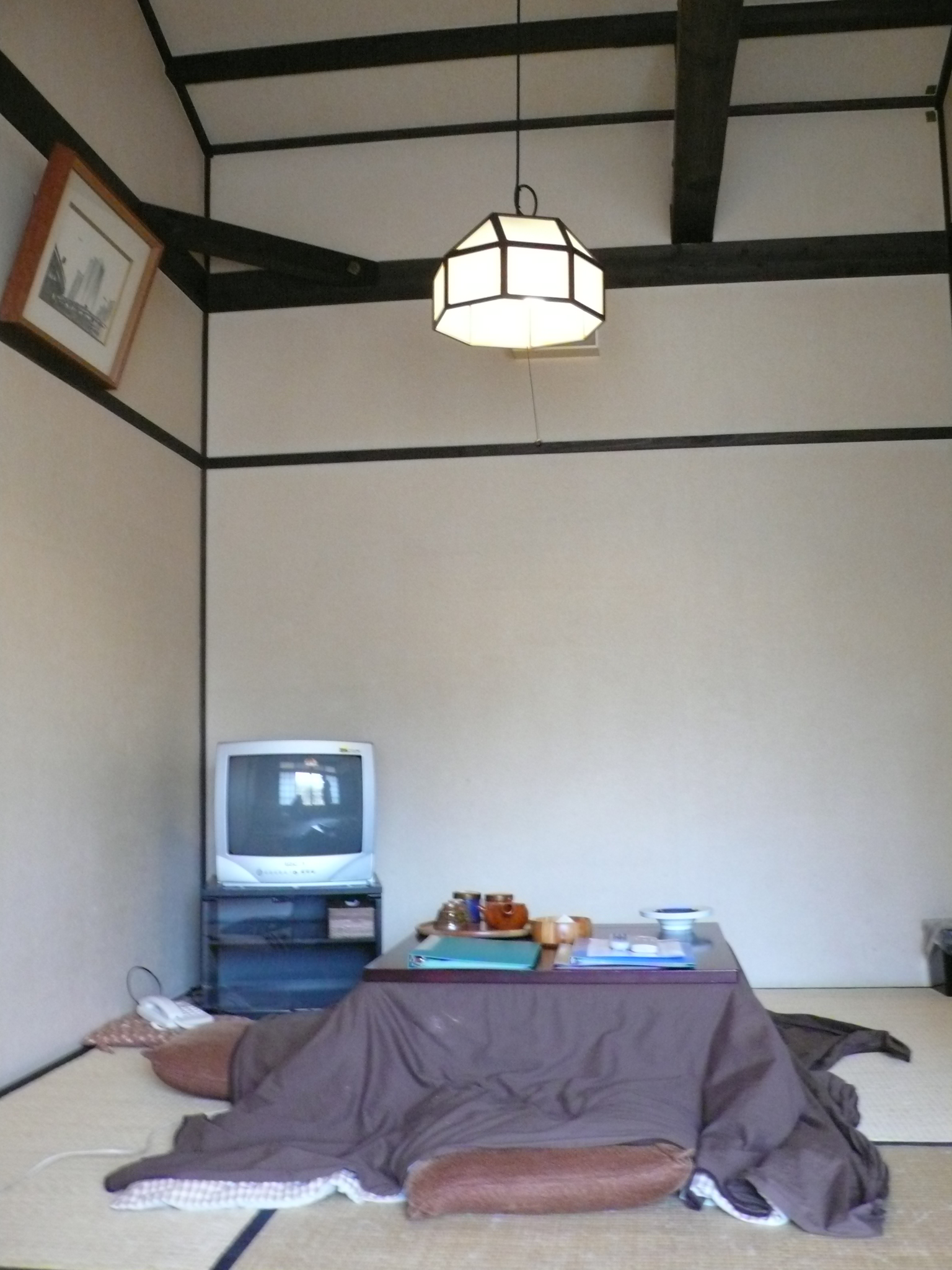 一坐進去就不想出來了